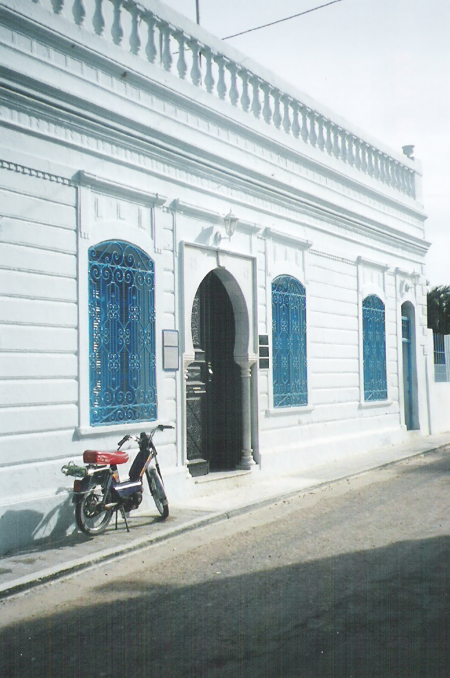 Synagogue de la Ghriba